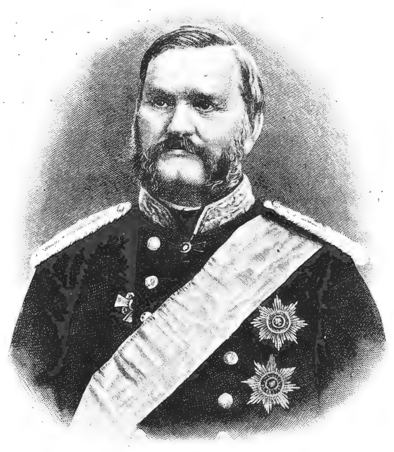 Журавский, Дмитрий Иванович